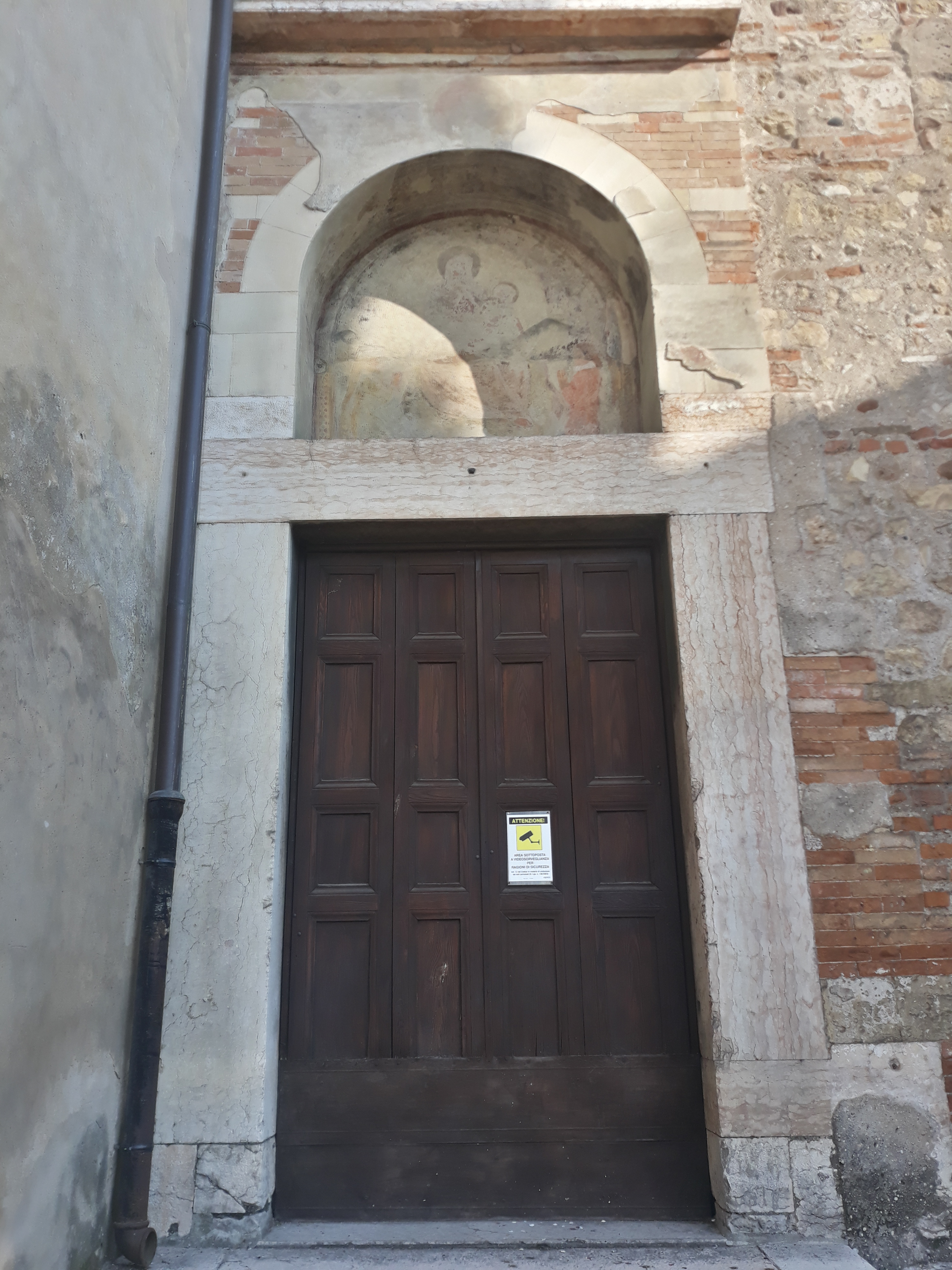 Chiesa di Santo Stefano a Verona